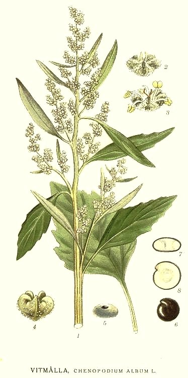 Original Description Vitmålla, Chenopodium album L.